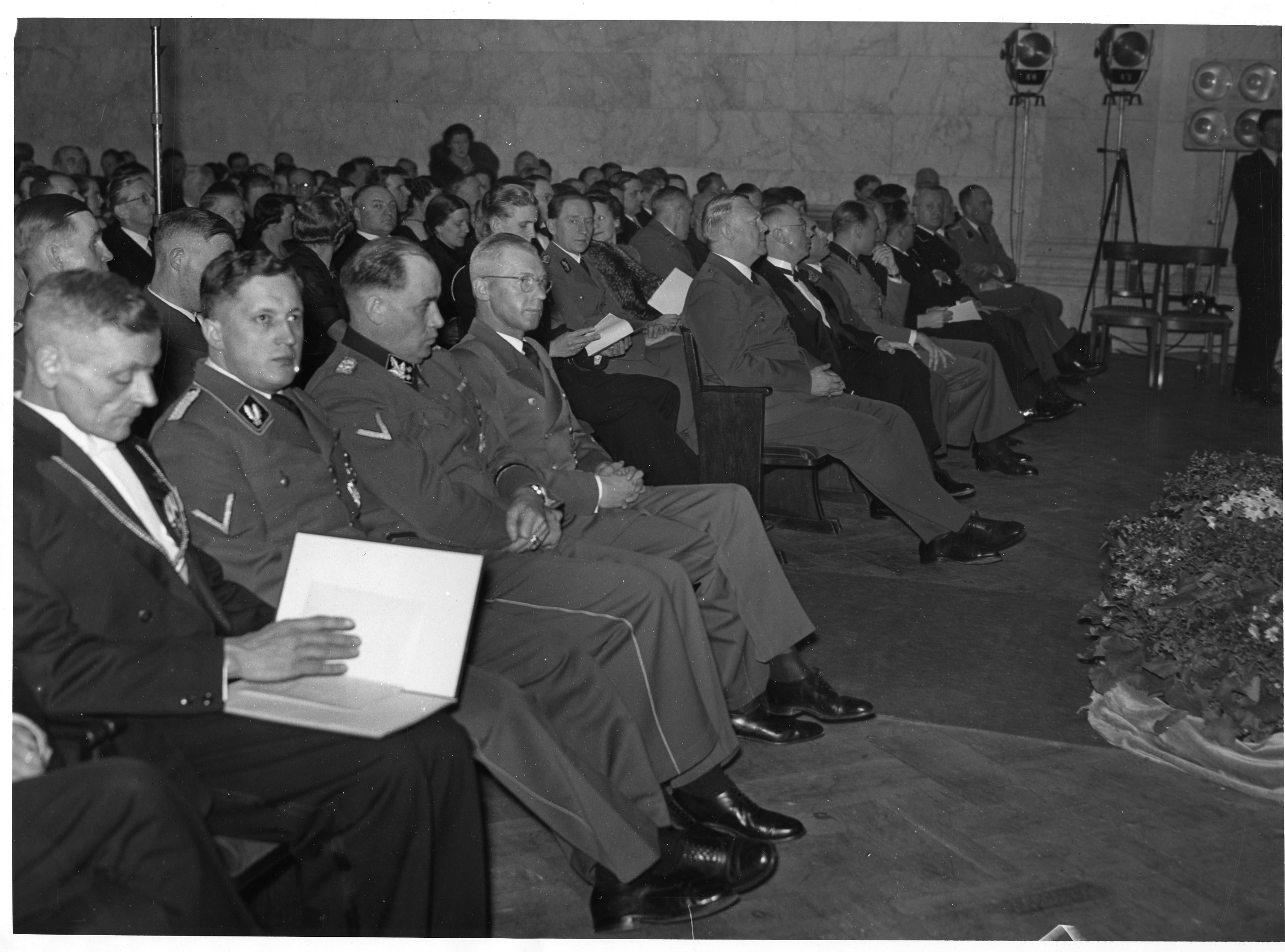 1944/04/23. RA/RAFA-3309/U 49B/9/49-9-18 img485